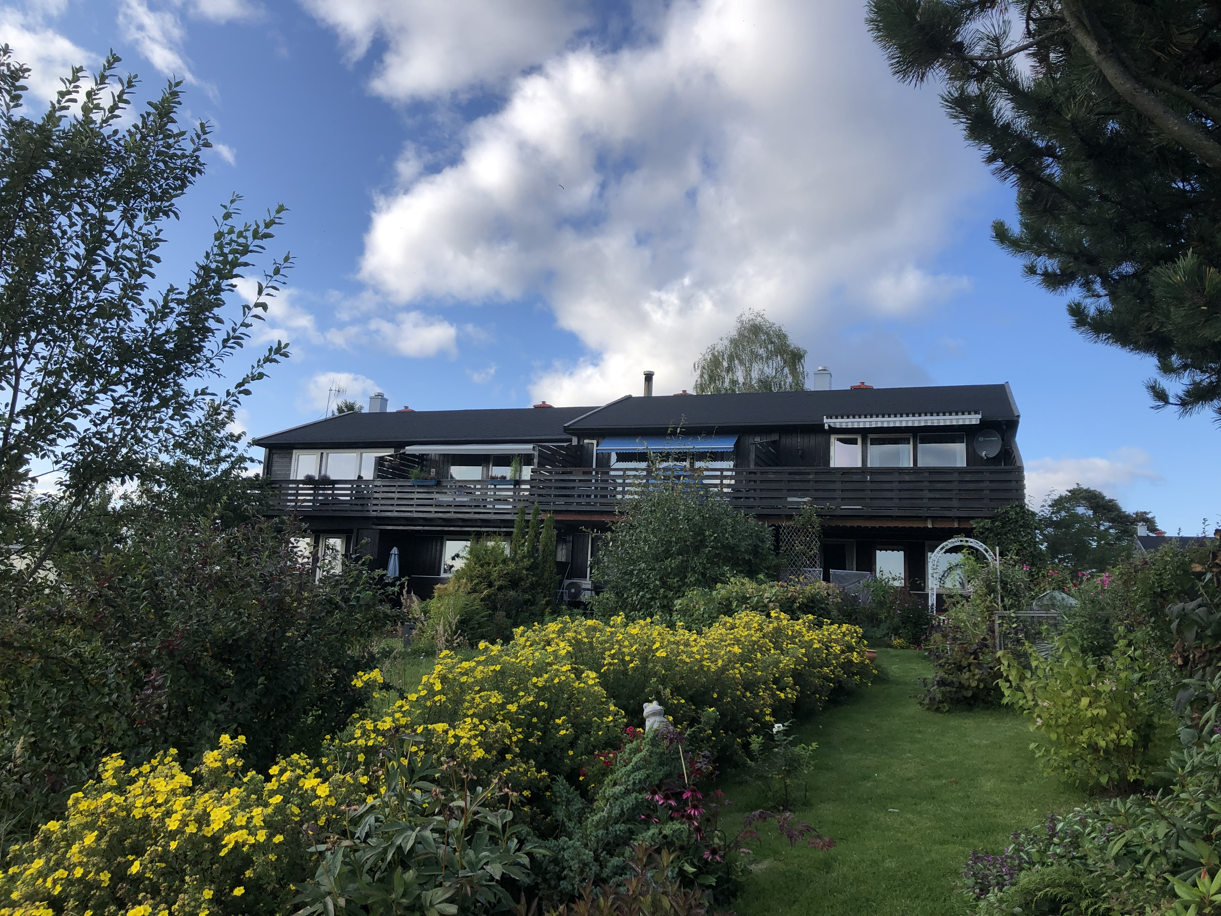 Veienmoen 70-76, Ringerike